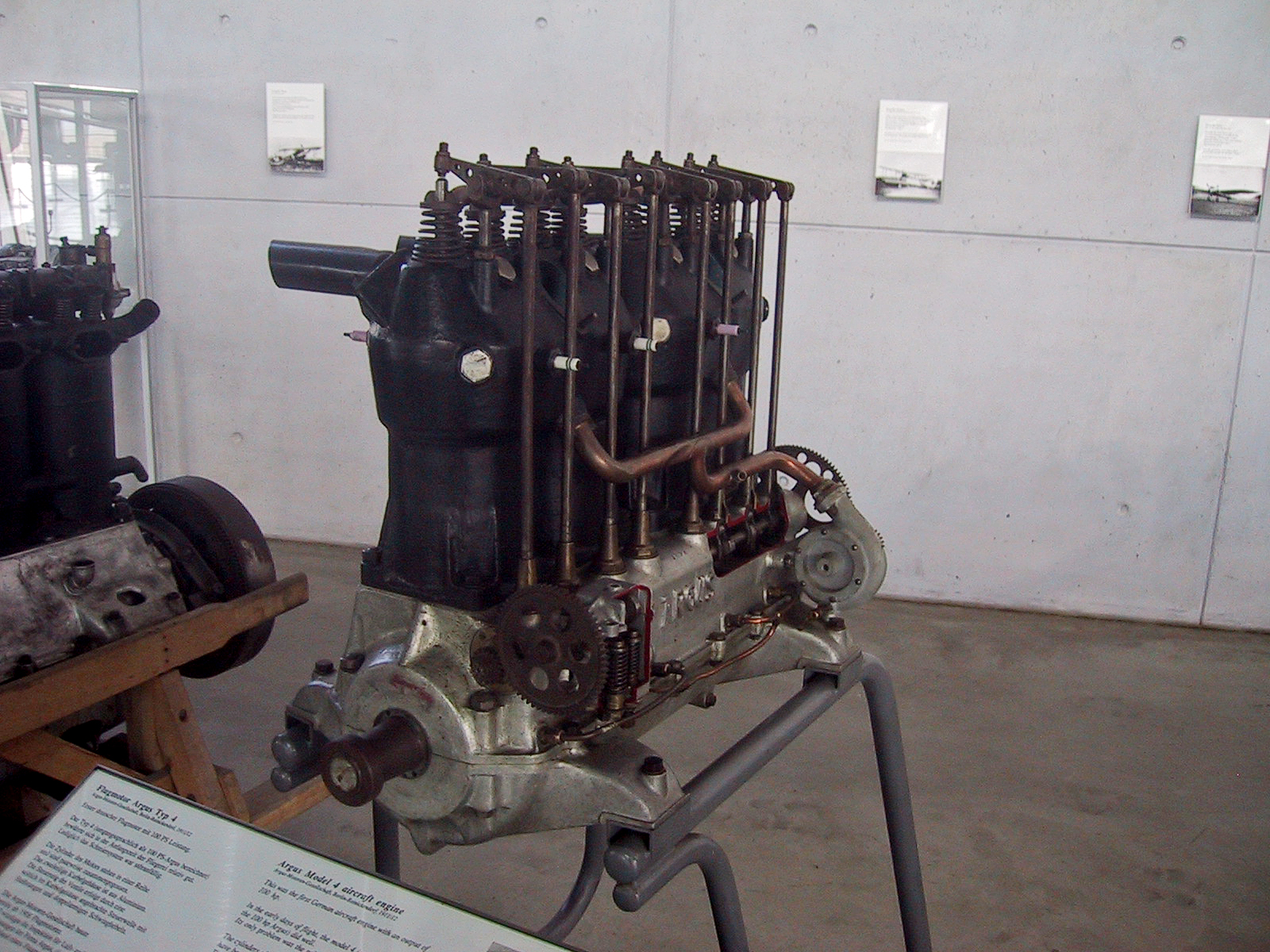 Argus Model 4 Aircraft Engine, Deutches Museum